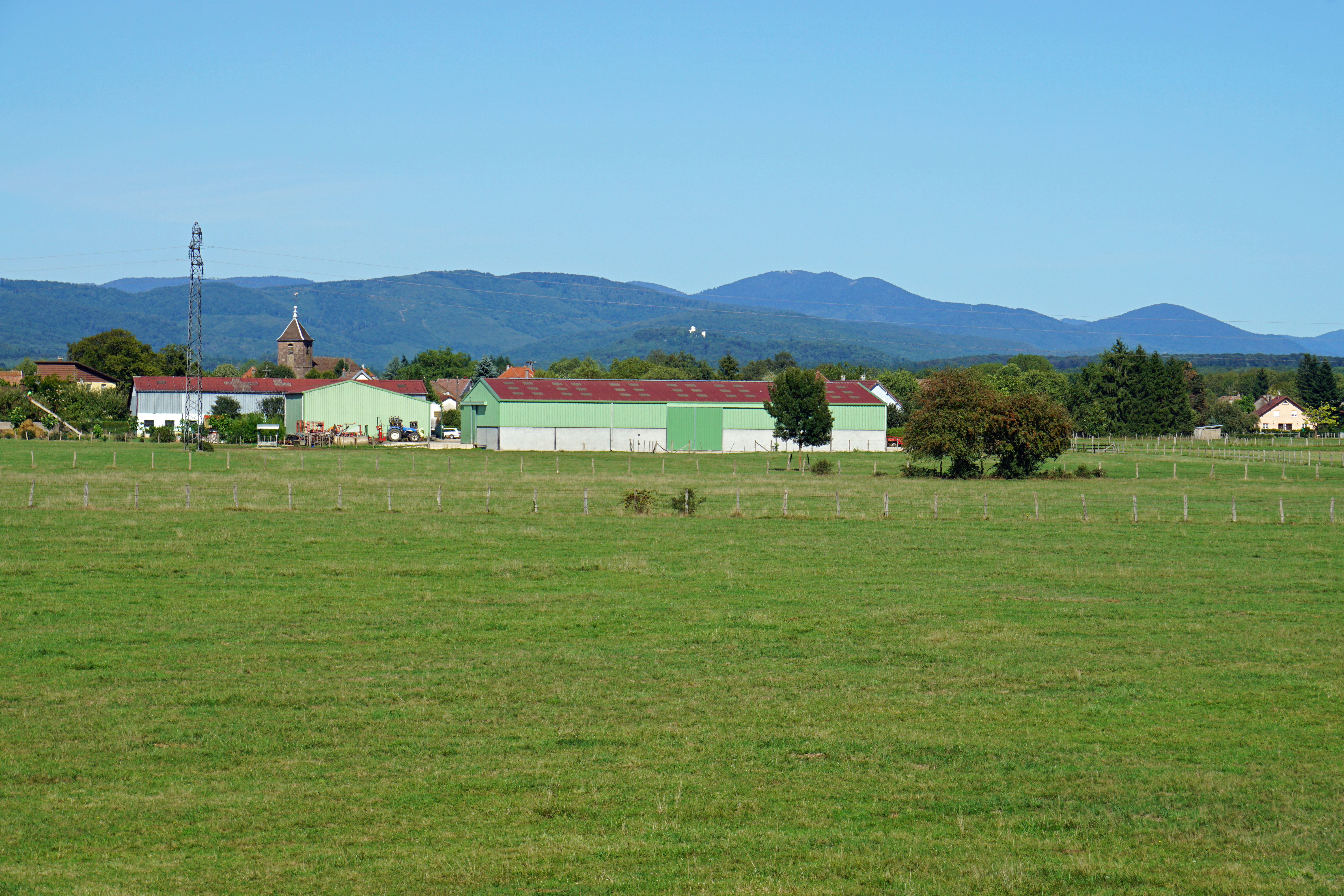 Vue sur le village de Roye (Haute-Saône) et du massif des Vosges.